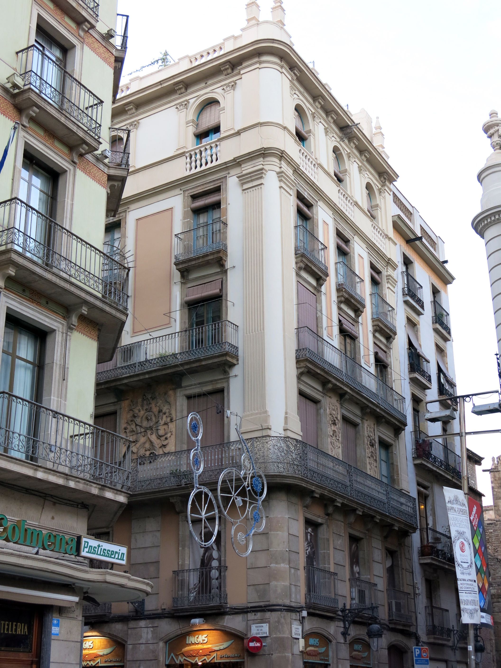 Casa Baulés (Barcelona)